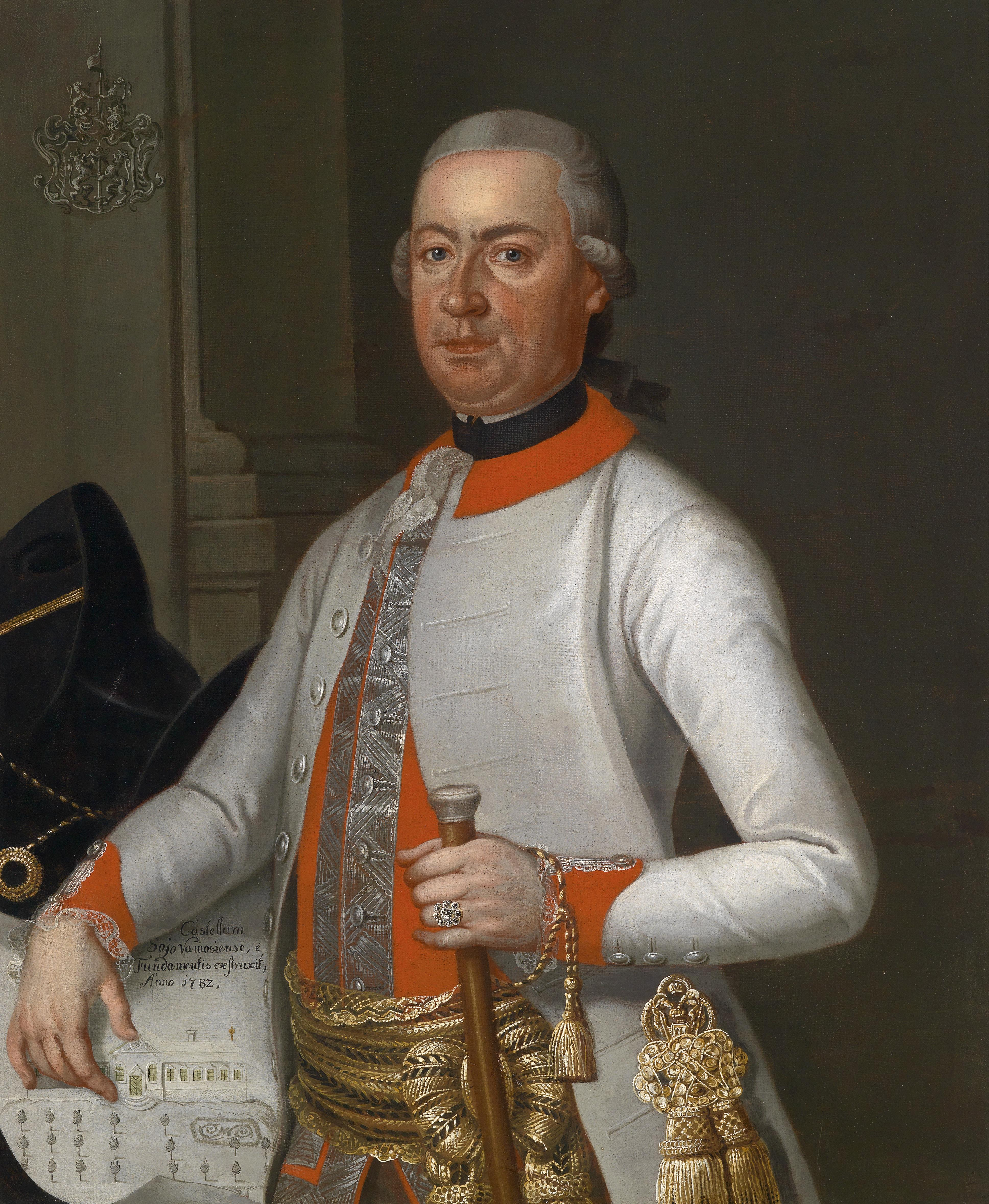 Bildnis eines Grafen Keglevich de Buzin, neben ihm eine auf 1782 datierte Ansicht des von ihm erbauten ungarischen Schlosses Sajóvámos, oben links sein Wappen, Österreichische Schule der 2. Hälfte des 18. Jahrhunderts; Provenienz: aus österreichischem Adelsbesitz.